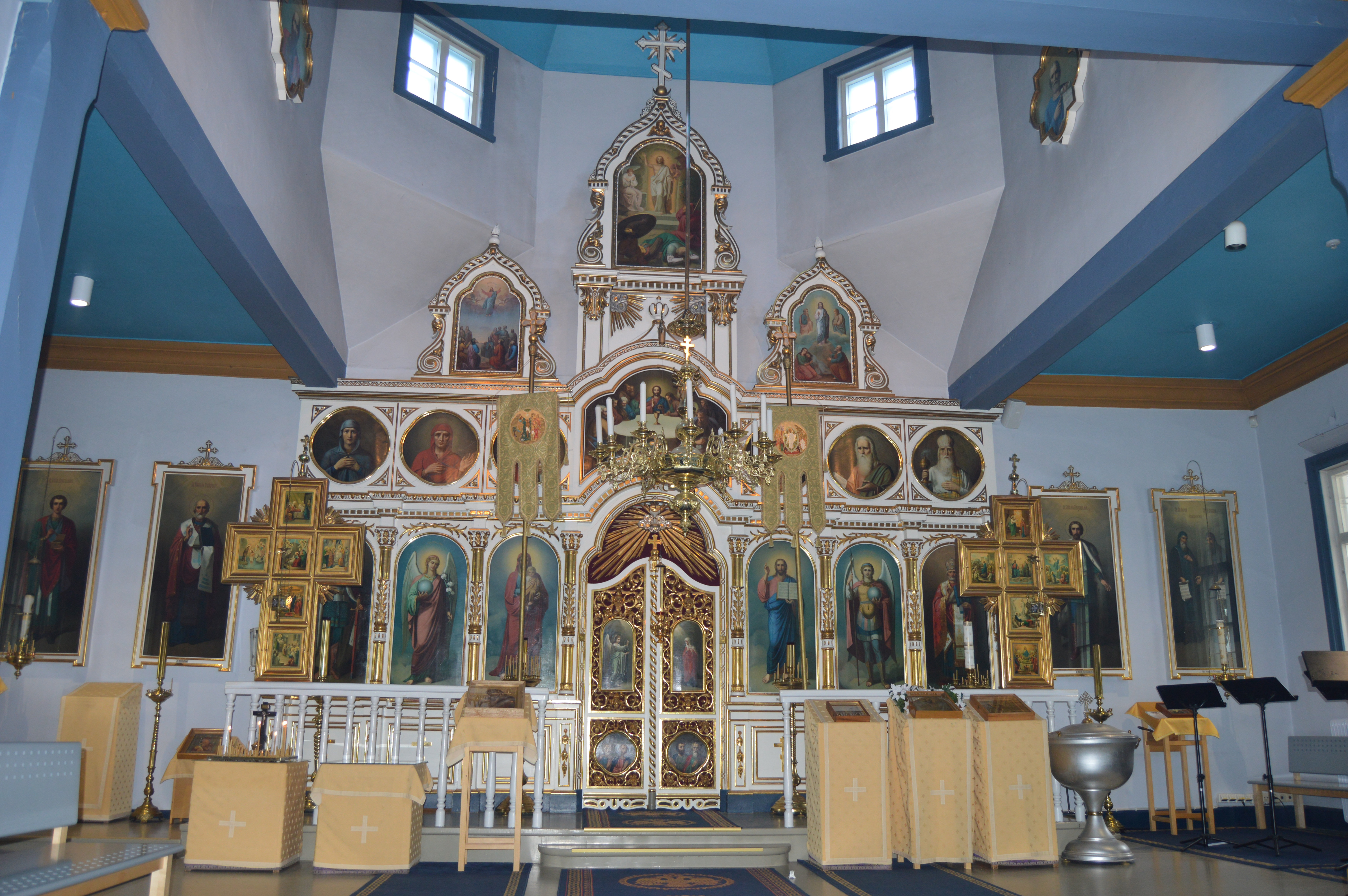 Joensuun Pyhän Nikolaoksen kirkon ikonostaasi